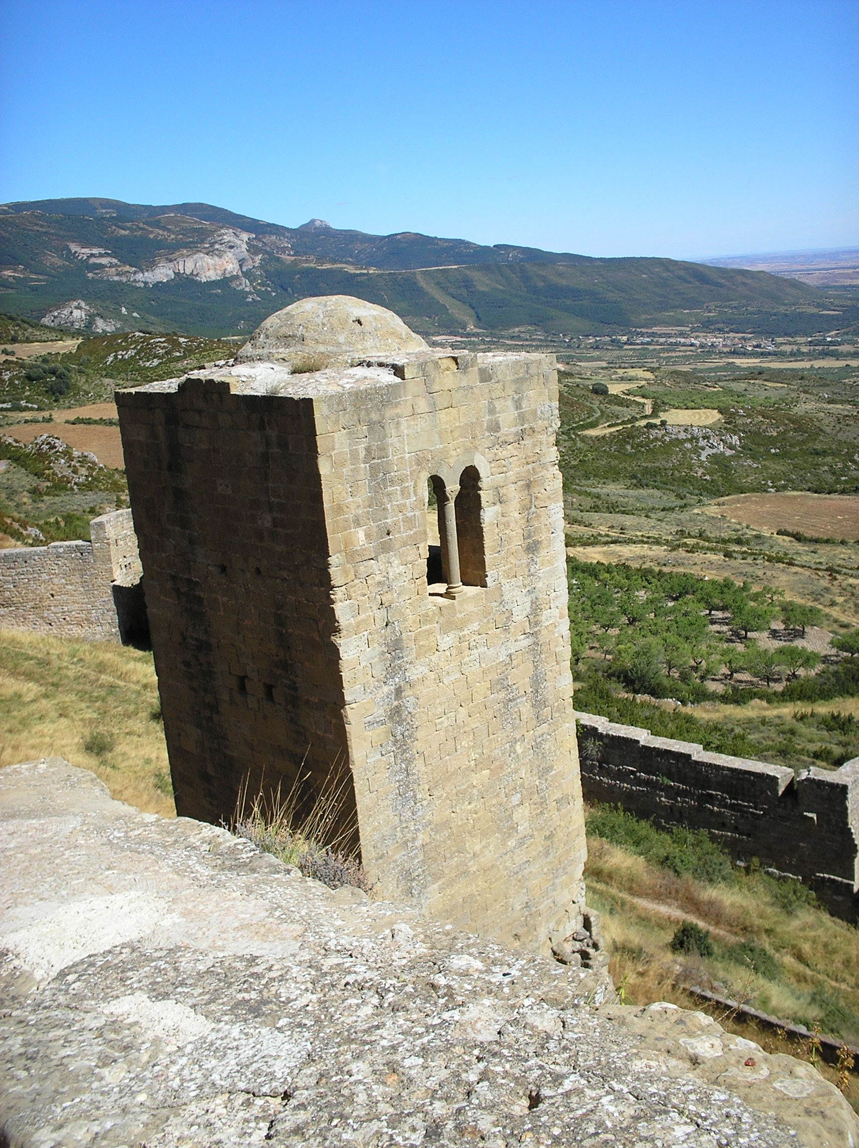 tour flanquante du château de Loarre / side tower in Loarre Castle